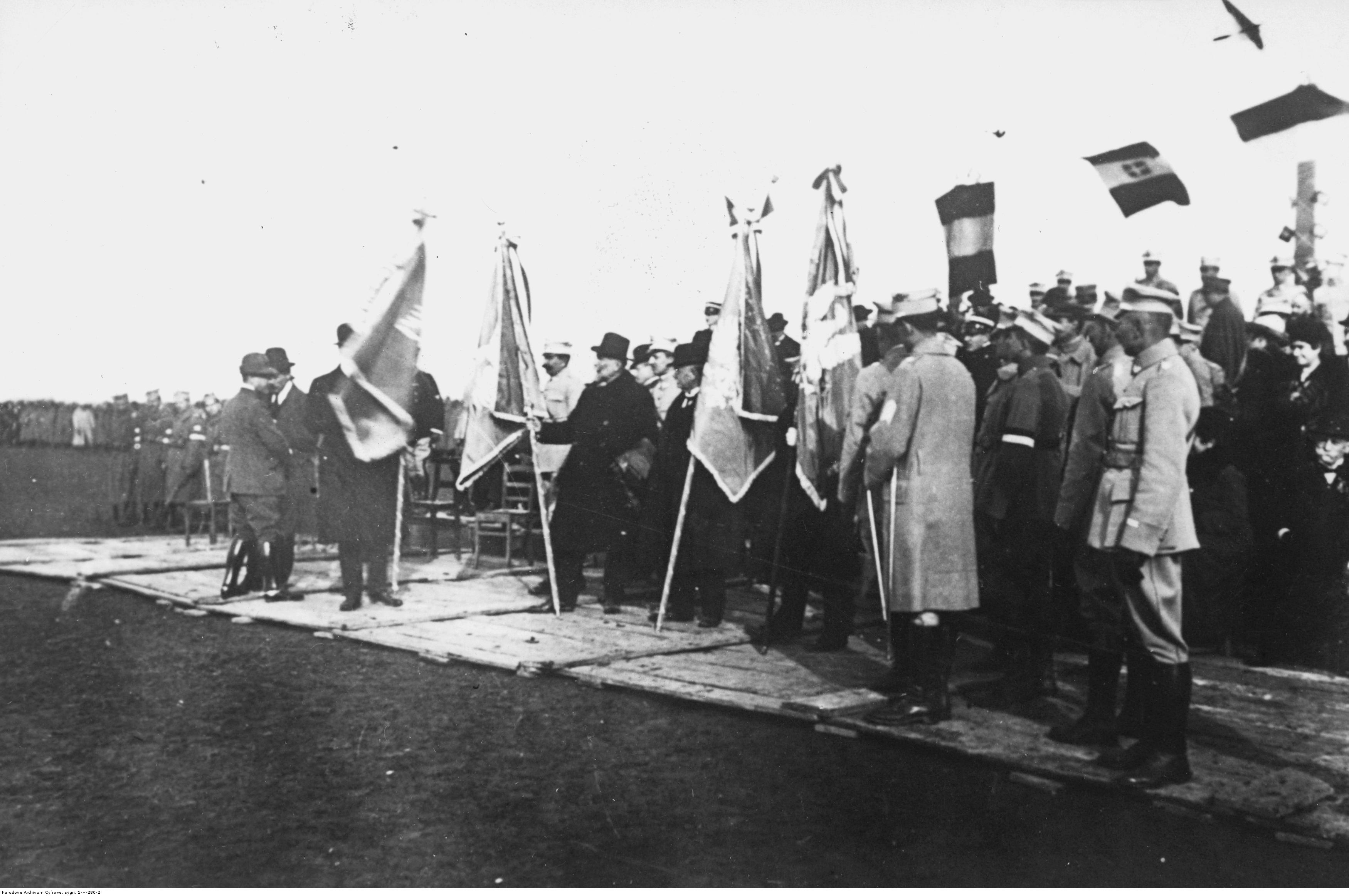 Polski obóz wojskowy w La Mandria di Chivasso. Trybuna honorowa podczas uroczystości wręczenia czterech sztandarów pułkom polskim przez delegacje miast włoskich. Koncern Ilustrowany Kurier Codzienny - Archiwum Ilustracji. Sygnatura: 1-H-280-2